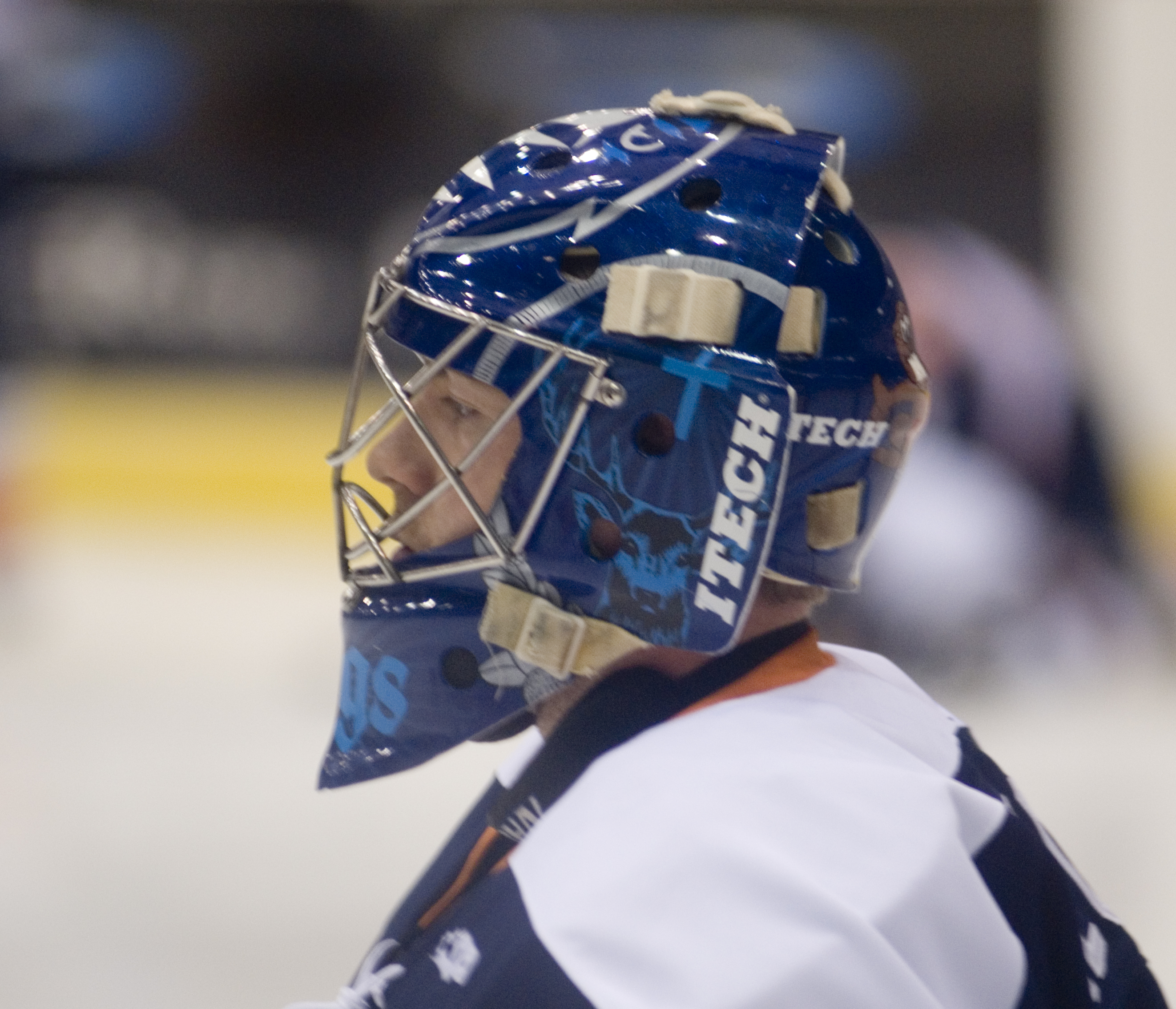 Utah Grizzlies @ Long Beach Ice Dogs, ECHL, 2007-01-27